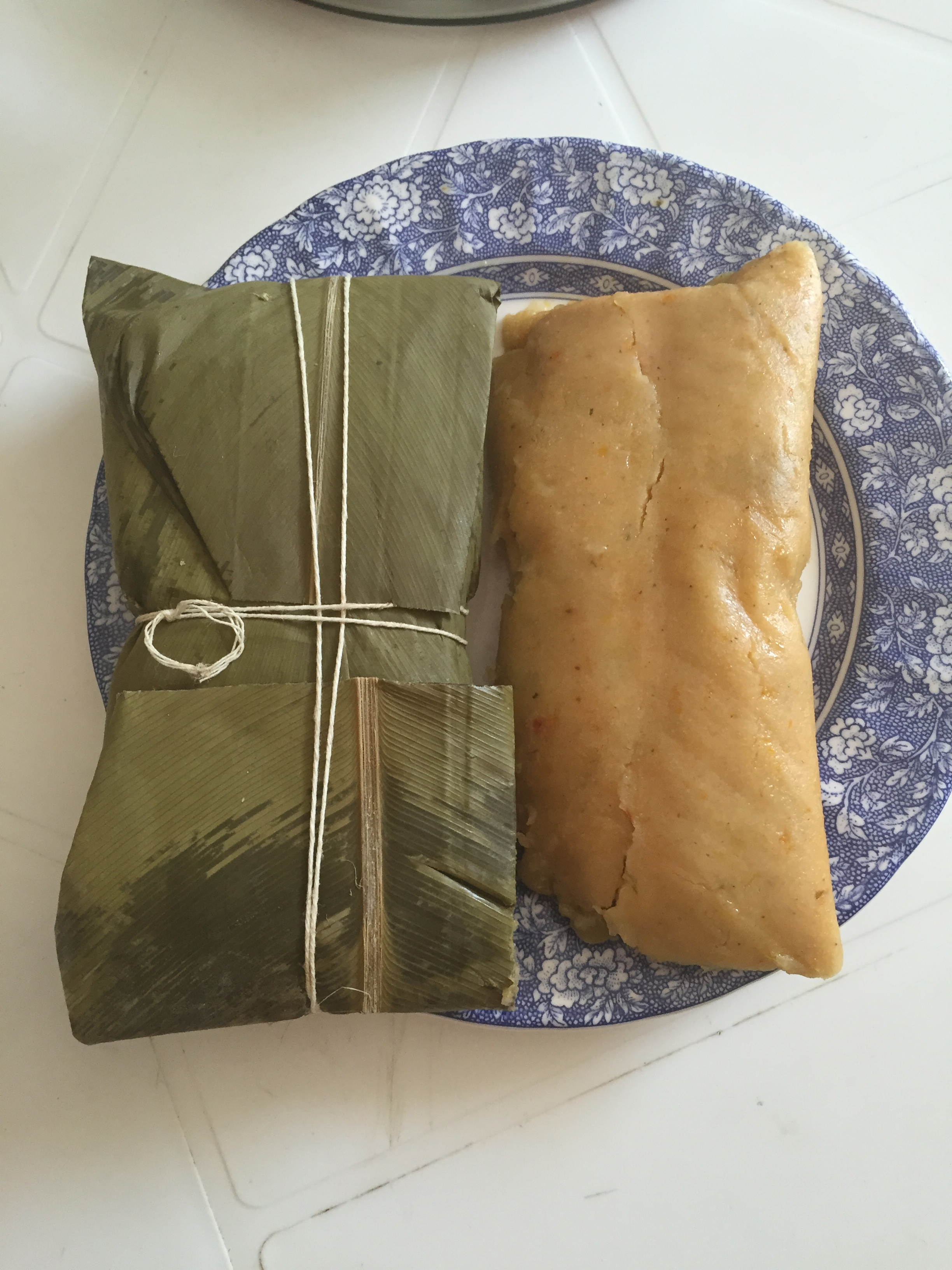 Hallaca